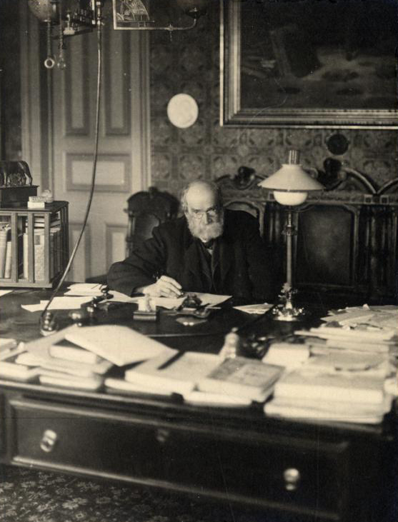 Diego Jacinto Agustín Barros Arana (* 16 de agosto de 1830, Santiago - † 4 de noviembre de 1907, Santiago) pedagogo, diplomático e historiador chileno. Es considerado un gran historiador chileno del siglo XIX